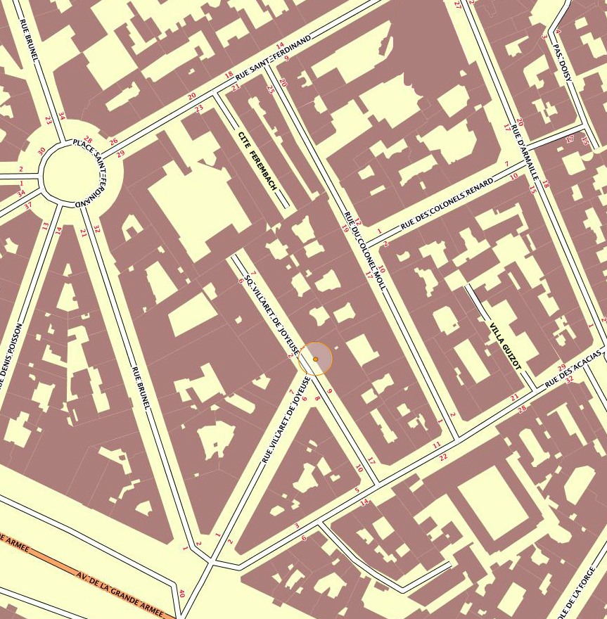 ferdinandville, rue Villaret de Joyeuse et plan IGN actuel modifié